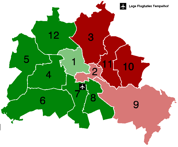 Anteil der Befürworter der Weiterführung des Flughafens Berlin-Tempelhof unter den Teilnehmern am Volksentscheid "Tempelhof bleibt Verkehrsflughafen!" am 27. April 2008 nach Bezirken (Quelle der Daten: ).